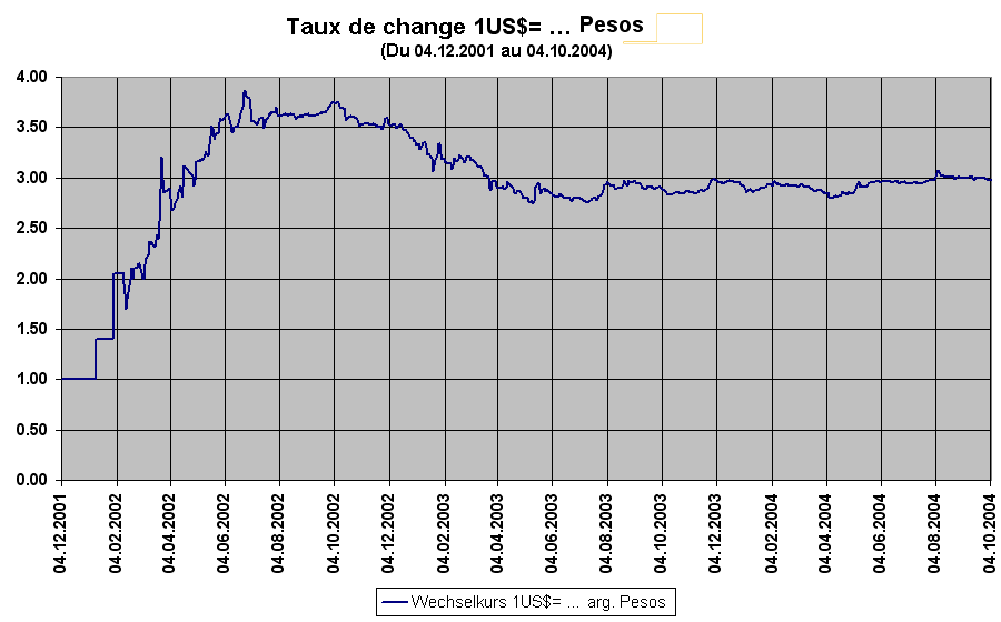 Évolution du taux de change entre le peso argentin et le dollar US entre le 04/12/2001 au 04/10/2004